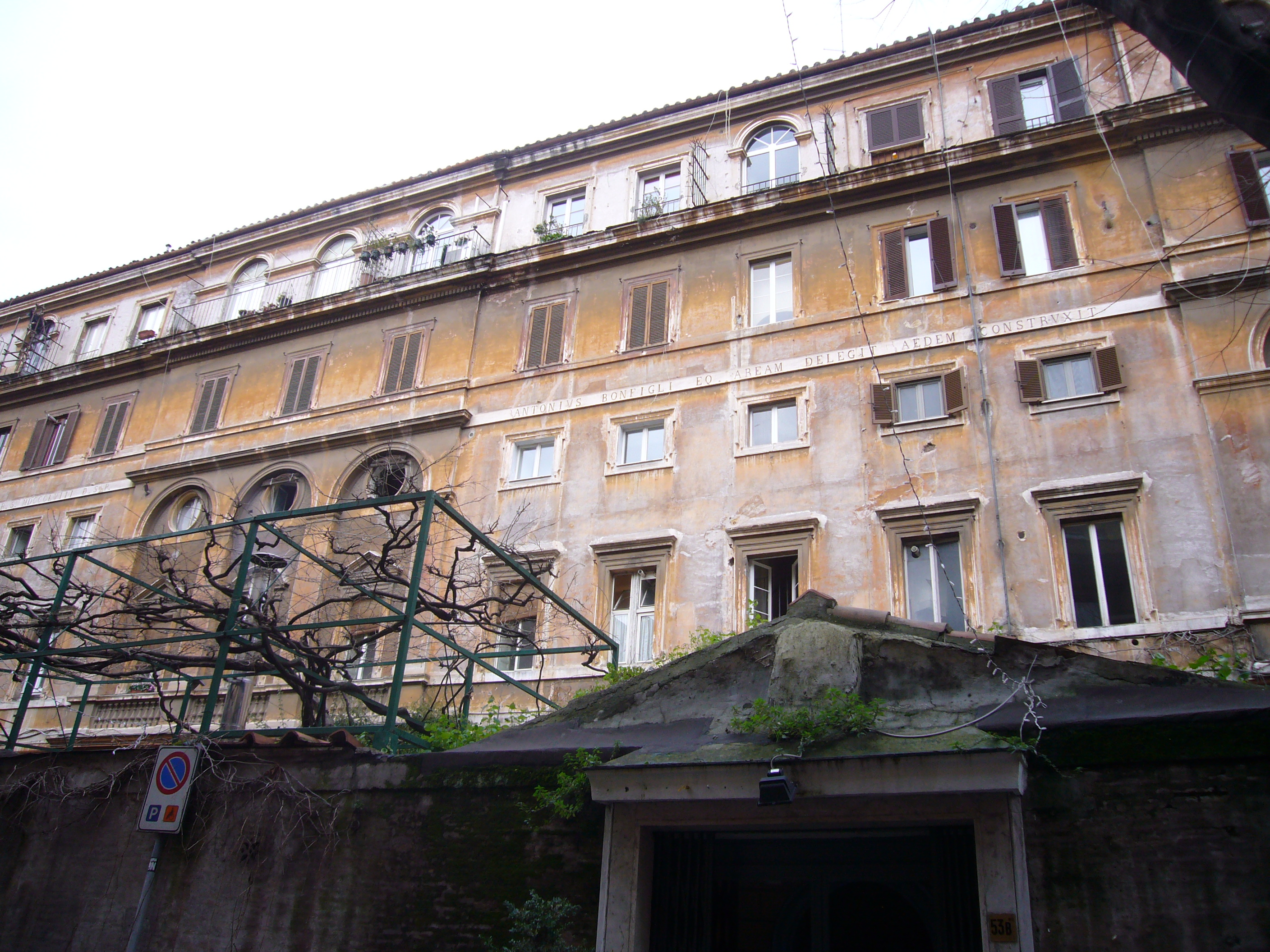 Roma, via Margutta, palazzo Patrizi, motto Bonfigli